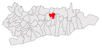 Categorie:Hărţi ale judeţului Călăraşi